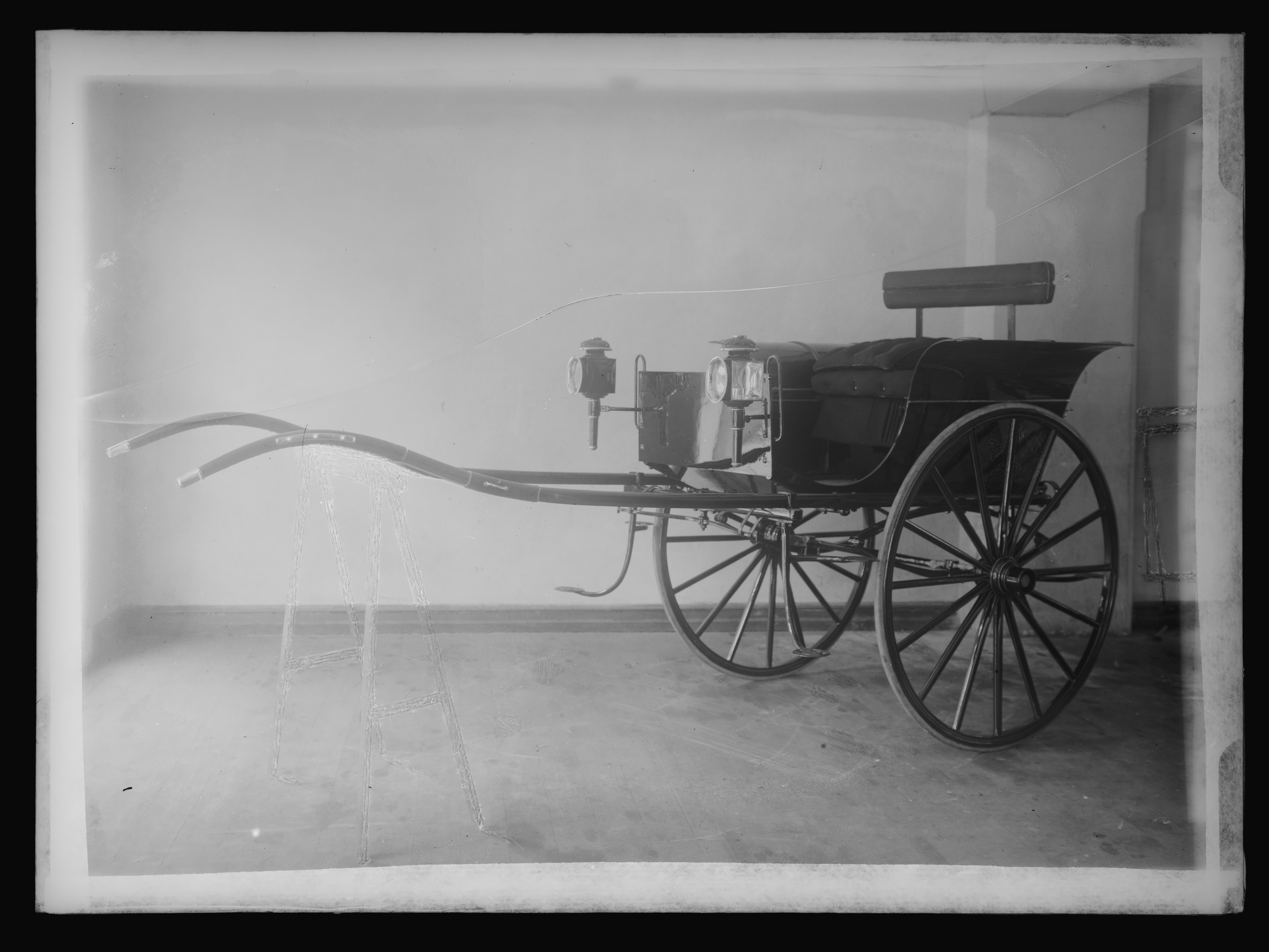 Bildet er hentet fra Nasjonalbibliotekets bildesamling. Anmerkninger til bildet var: Påskrift arkivark: Christoffersen, vognfabrikant Arkivnummer: 237